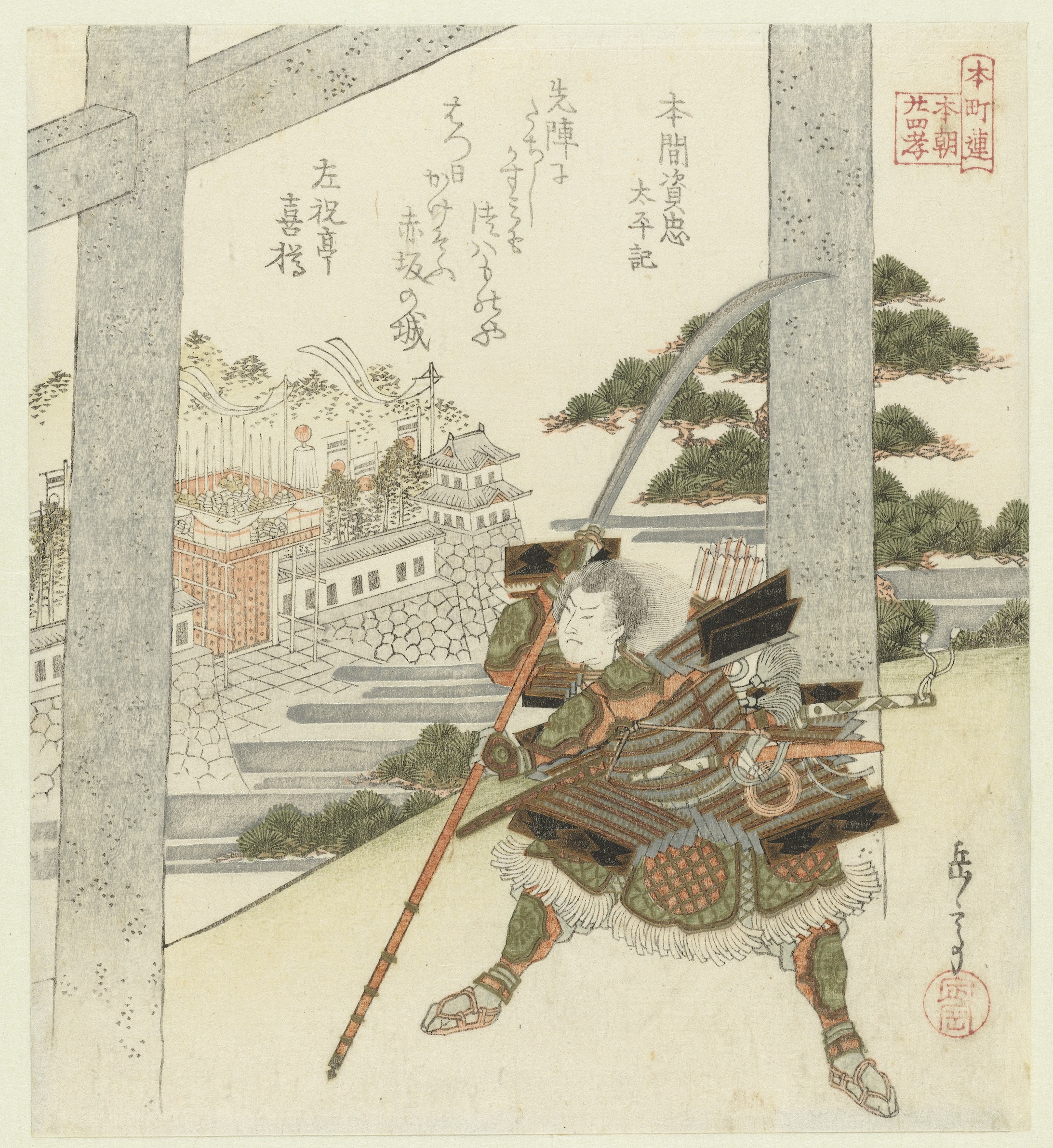 太平記の若武者本間資忠を描いた錦絵。資忠は赤坂城の戦いで北条方として楠木正成の籠る河内赤坂城を攻めるが、この戦いで戦死した父の首を弔ったのち、自らも城に攻め寄せて18歳で討ち死にした。